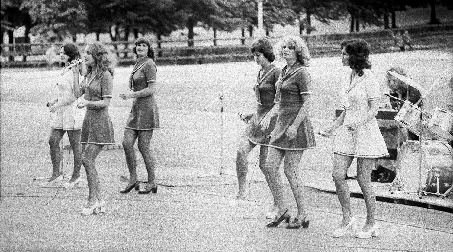 Laine 1975